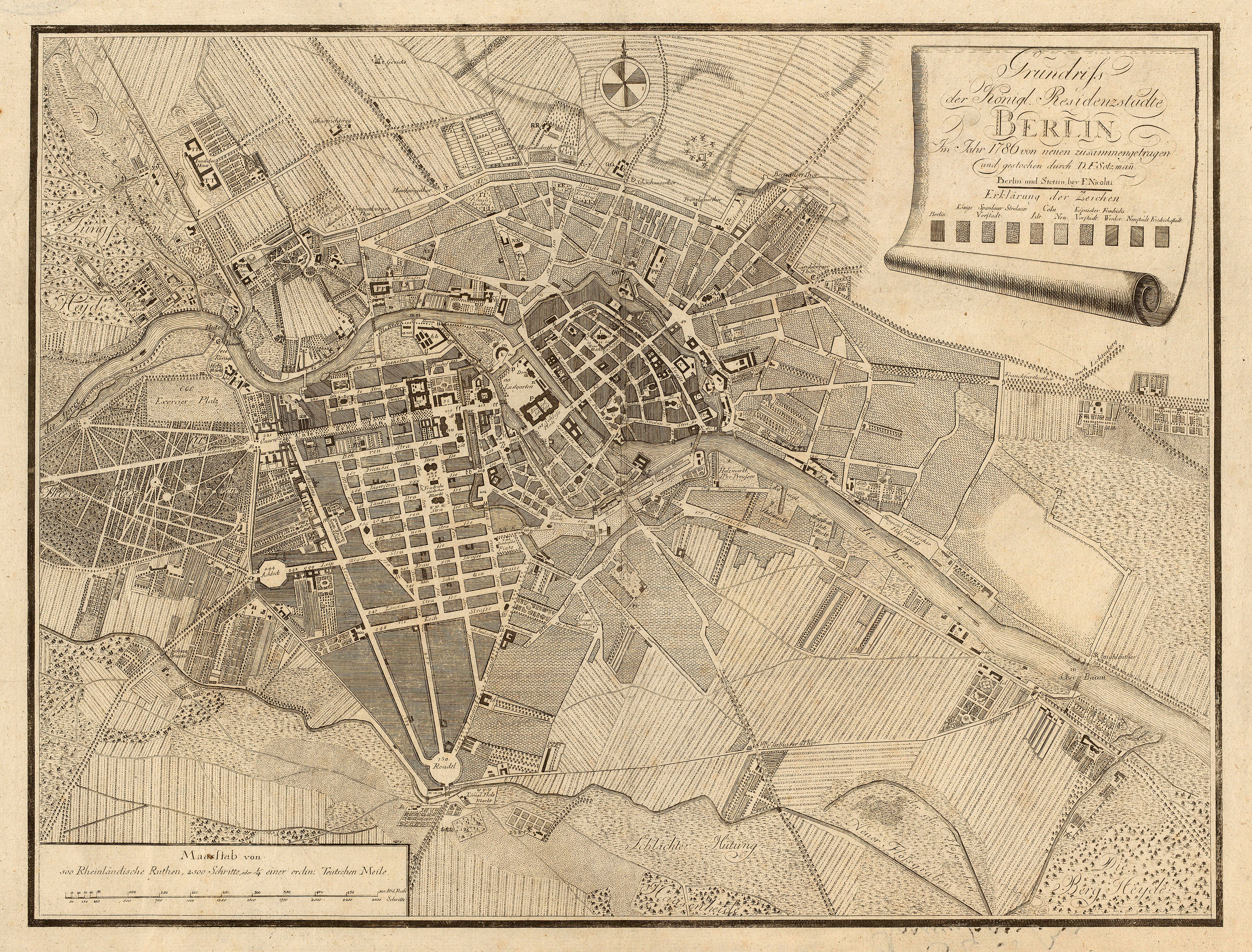 Rechts oben eine Papierrolle mit dem Titel und einer Zeichenerklärung mit 10 unterschiedlichen Schraffuren zu den 10 Teilstädten. Links unten ein Maßstab über "500 Rheinländische Ruthen, 2500 Schritte, oder 1/4 einer ordin: Teutschen Meile".